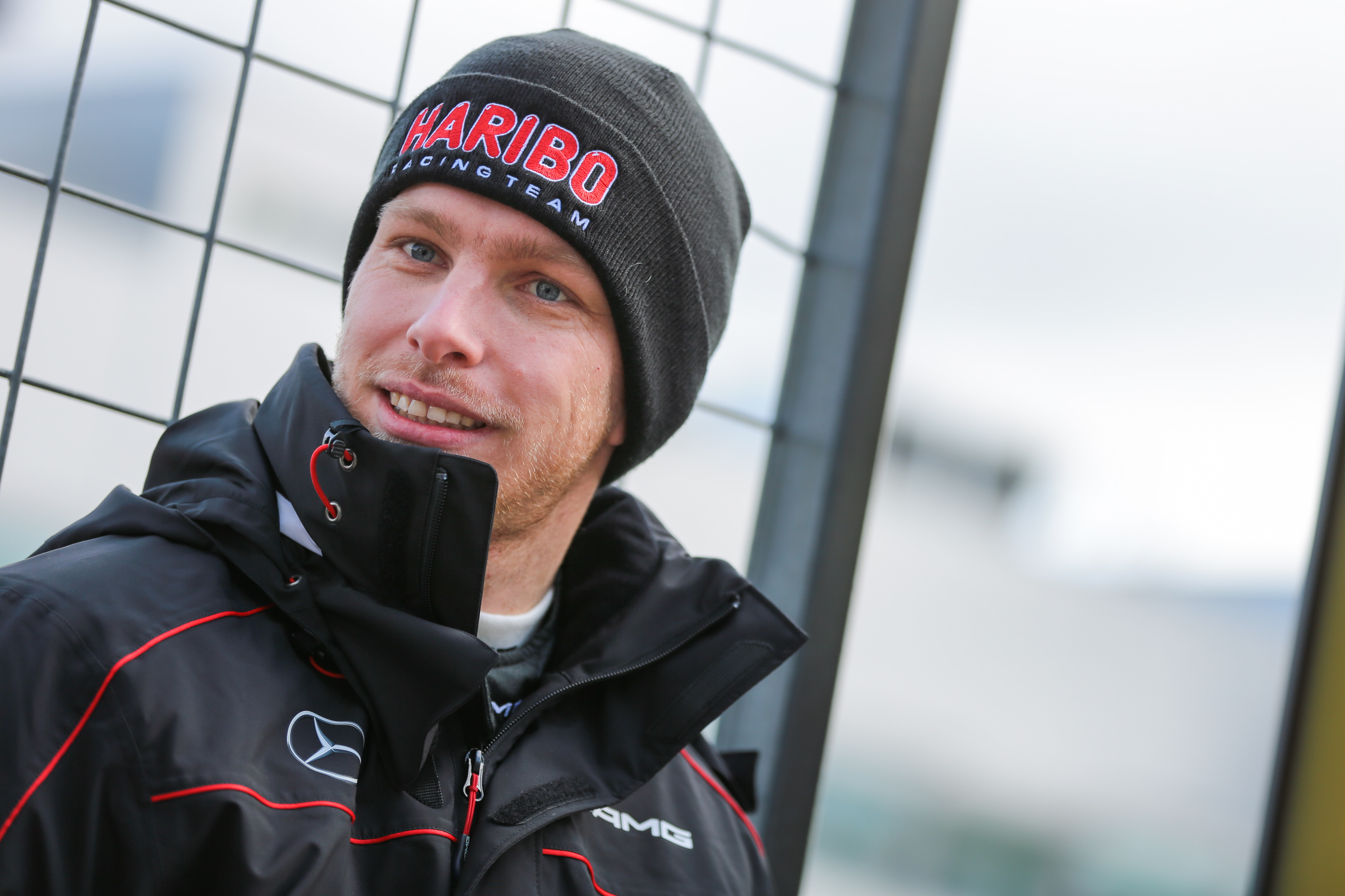 Jan Seyffarth